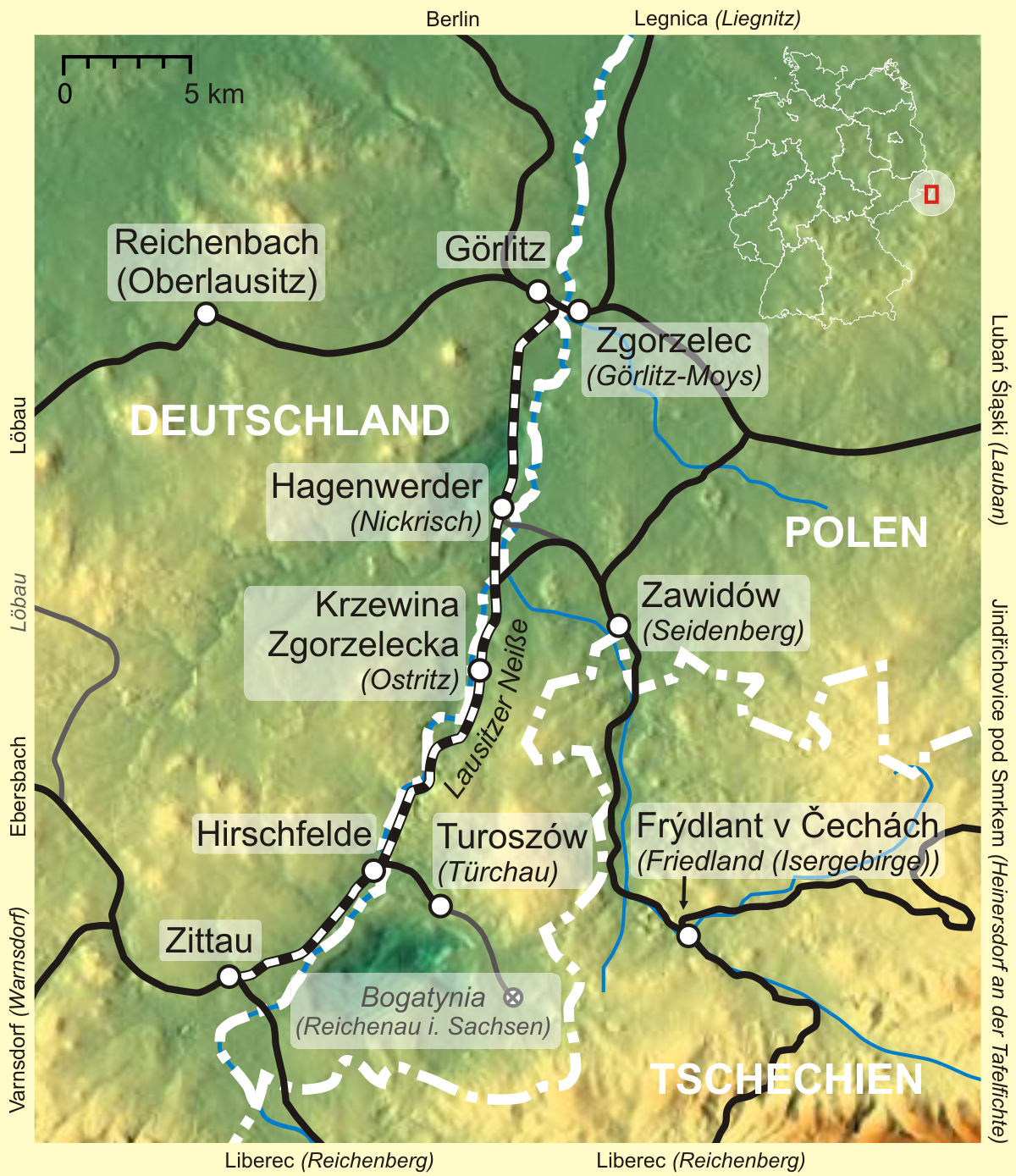 Verlaufskarte der Neißetalbahn